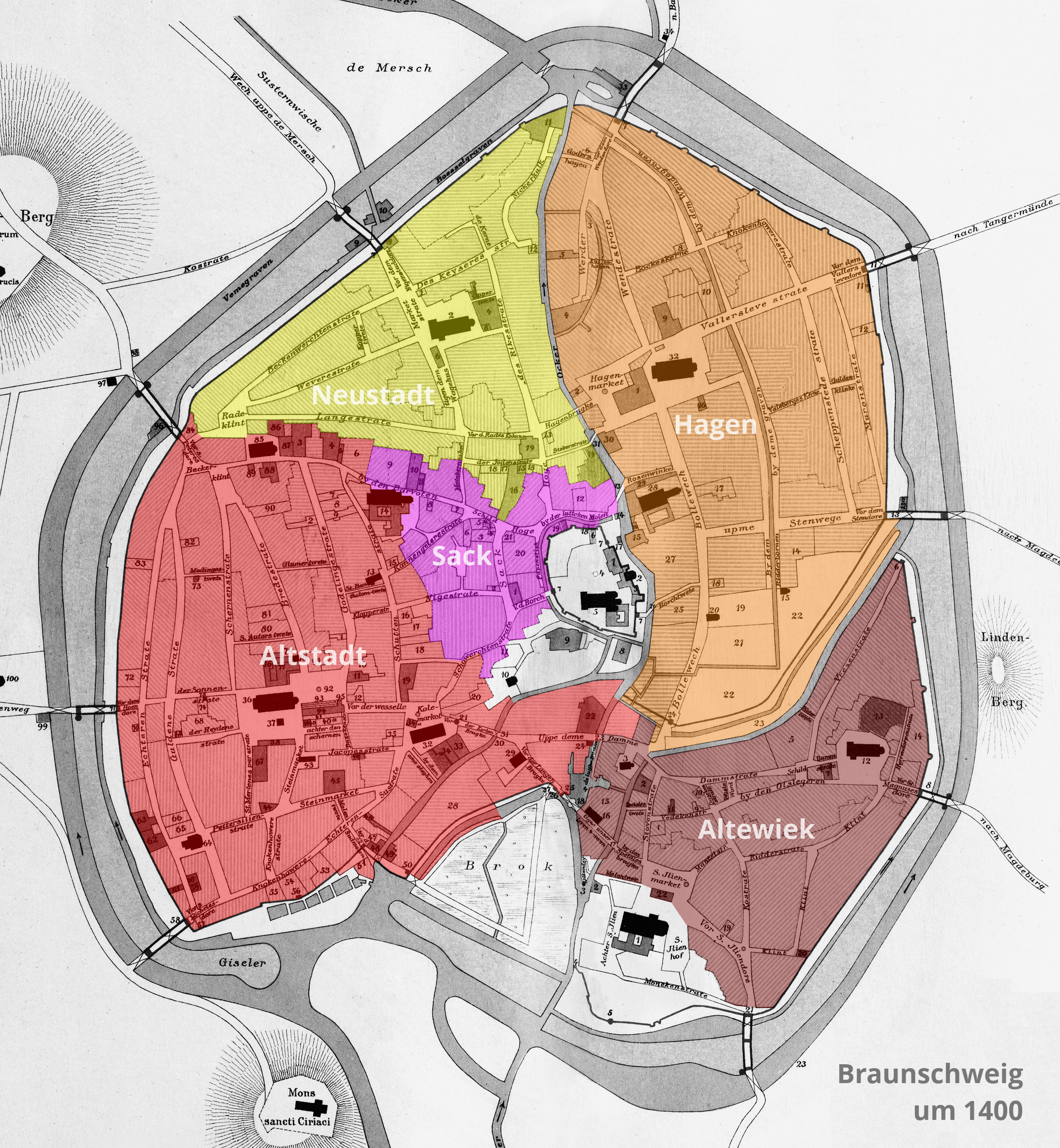 Die Weichbilde Braunschweigs auf einer Rekonstruktion des Zustands um 1400.